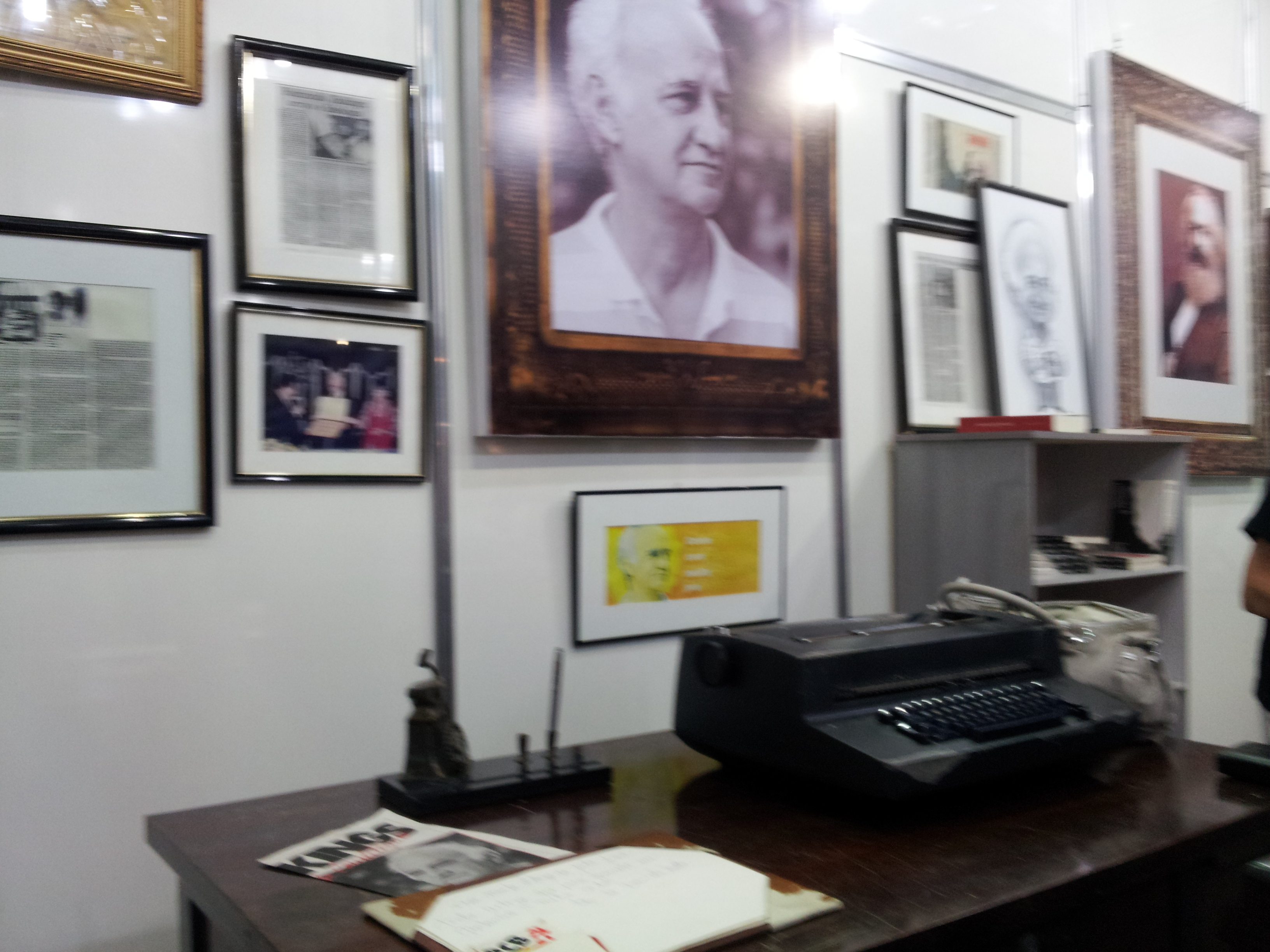 Estande de Homenagem Especial a Raimundo Jinkings, na XVII Feira Pan Amazônica do Livro, Belém, Pará